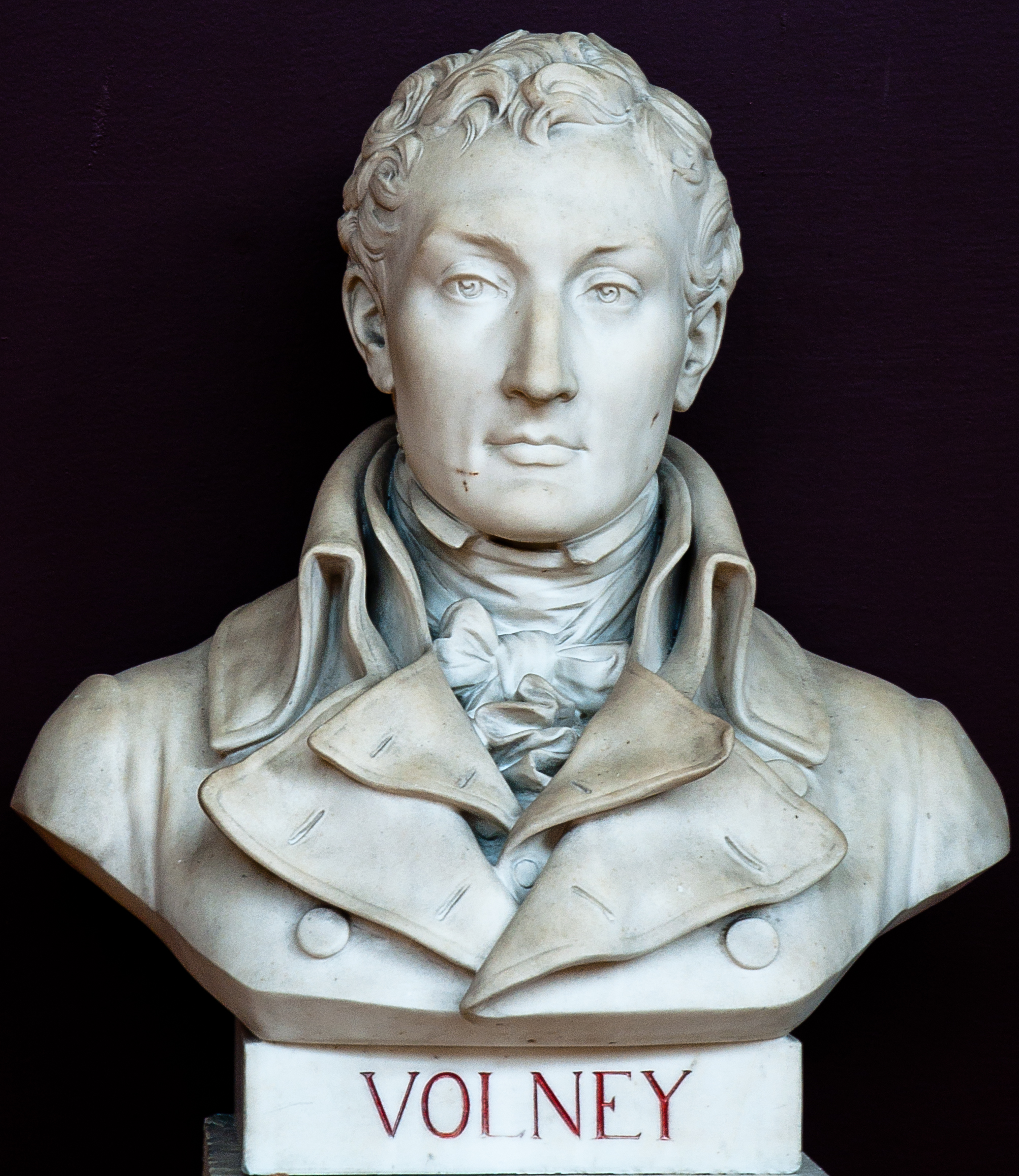 Buste de Constantin-François Chassebœuf de La Giraudais - comte Volney - dit Volney -- Salle du serment du jeu de paume -- Versailles